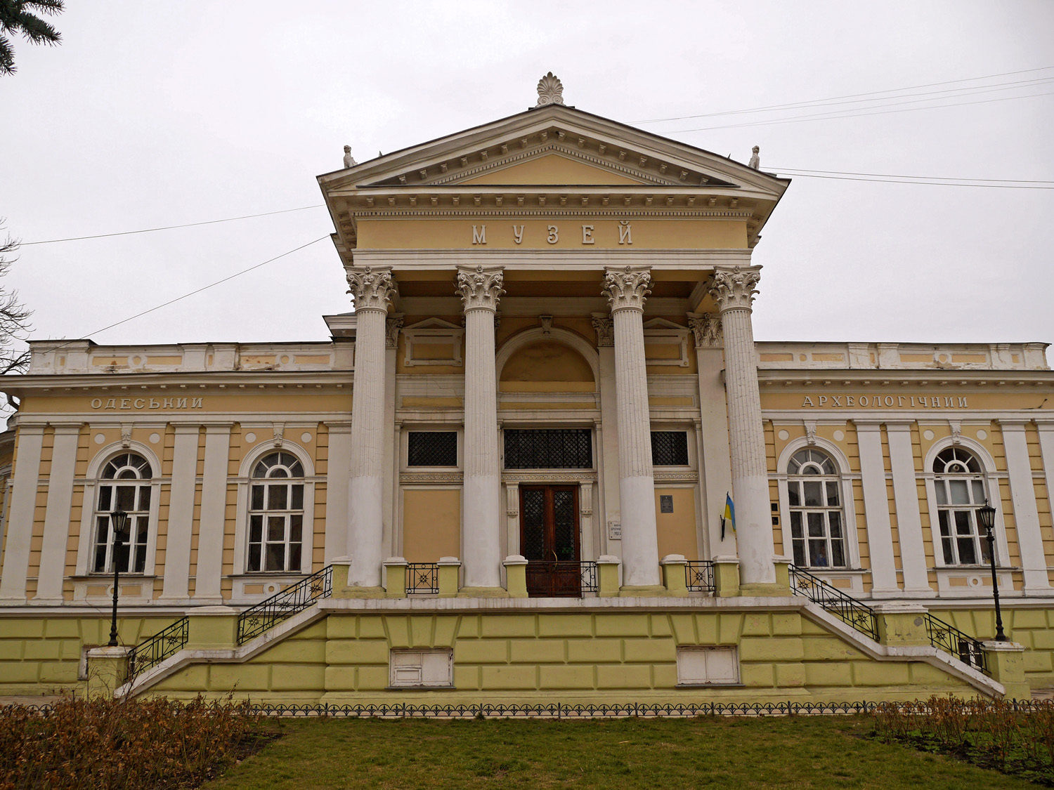 Будівля Археологічного музею, в якій містилась перша в Одесі Публічна бібліотека і працювало перше в Росії Товариство історії та старожитностей, де у 1883 році працював археолог Е. П. фон Штерн, Одеса, вул. Ланжеронівська, 4